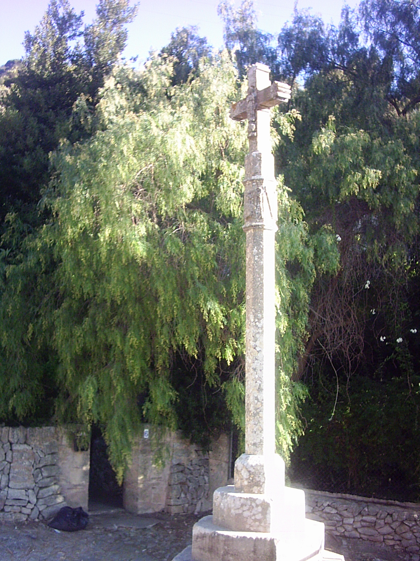 Creu de Randa.